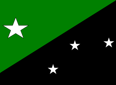 Bandera del municipio Jesús Enrique Lossada, del estado Zulia, Venezuela